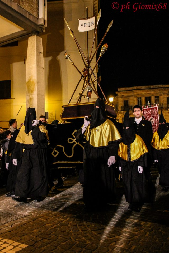 I membri dell' Arciconfraternita conducono uno dei vari simboli della Passione: le lance.